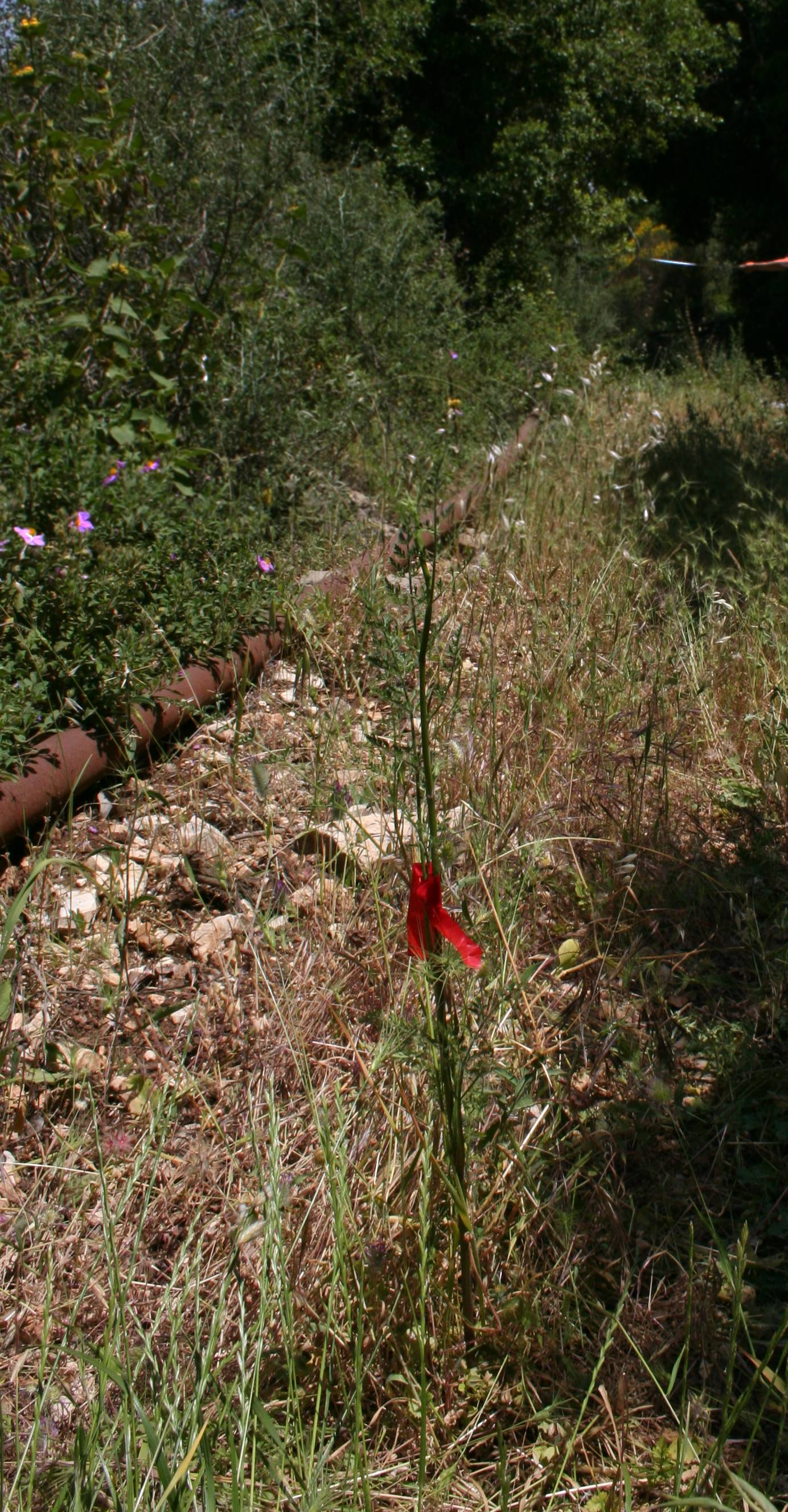 Markierung im Rahmen der zoologishcer Kartierung entlang eines Transekts in Galiläa/Israel 2009